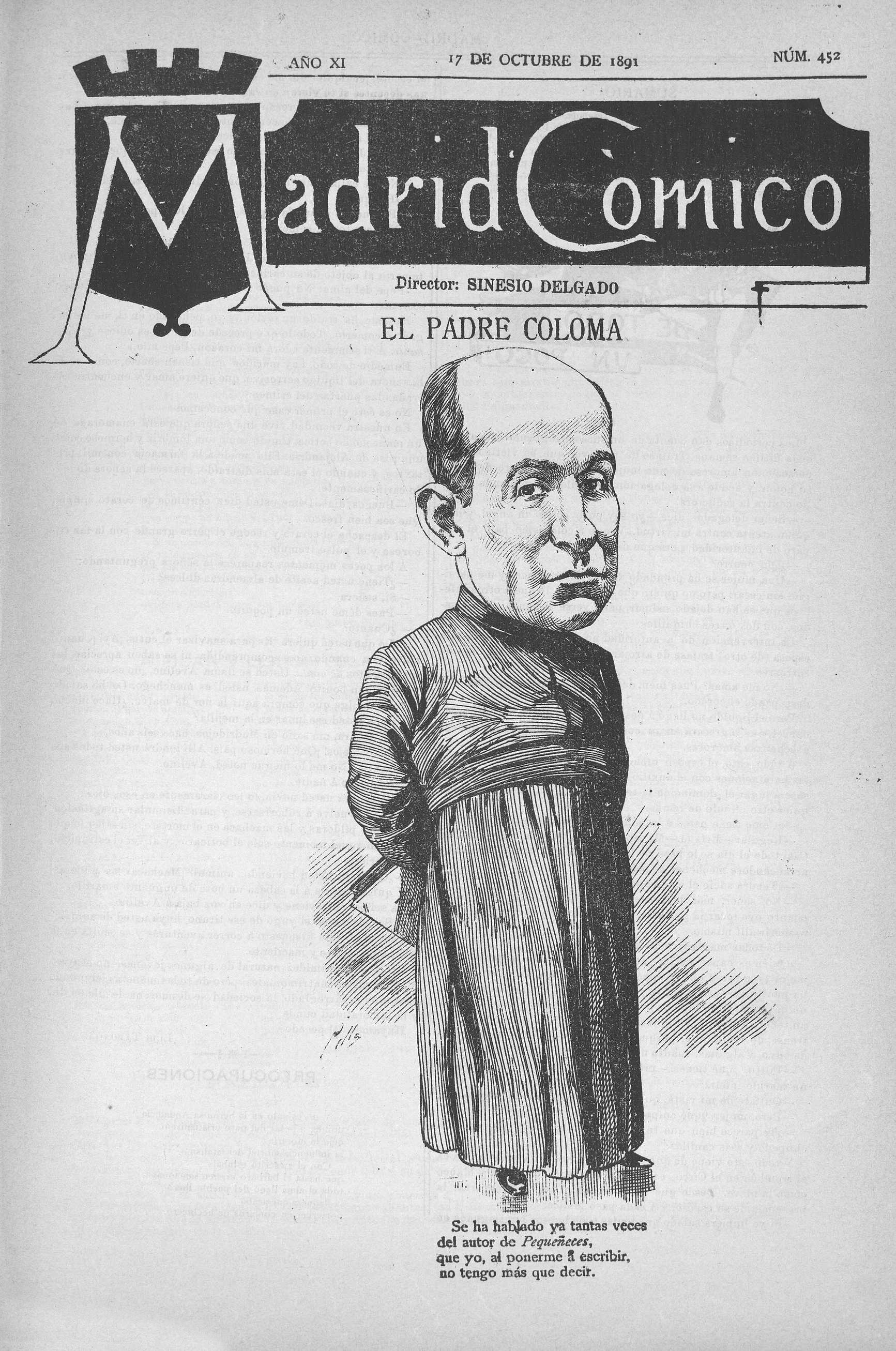 El padre Coloma.